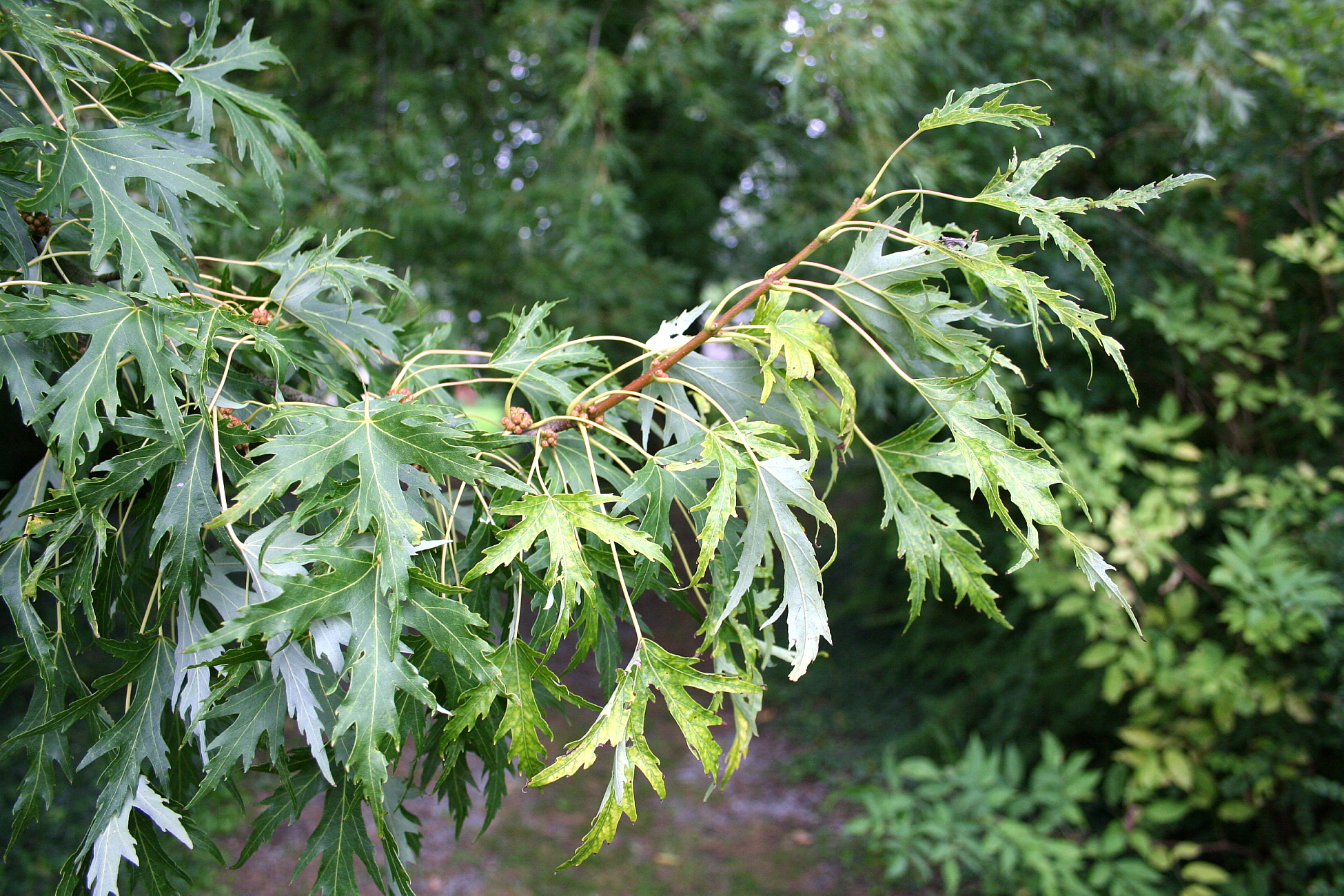 Érable argenté à feuilles laciniées (Acer saccharinum 'Laciniatum').